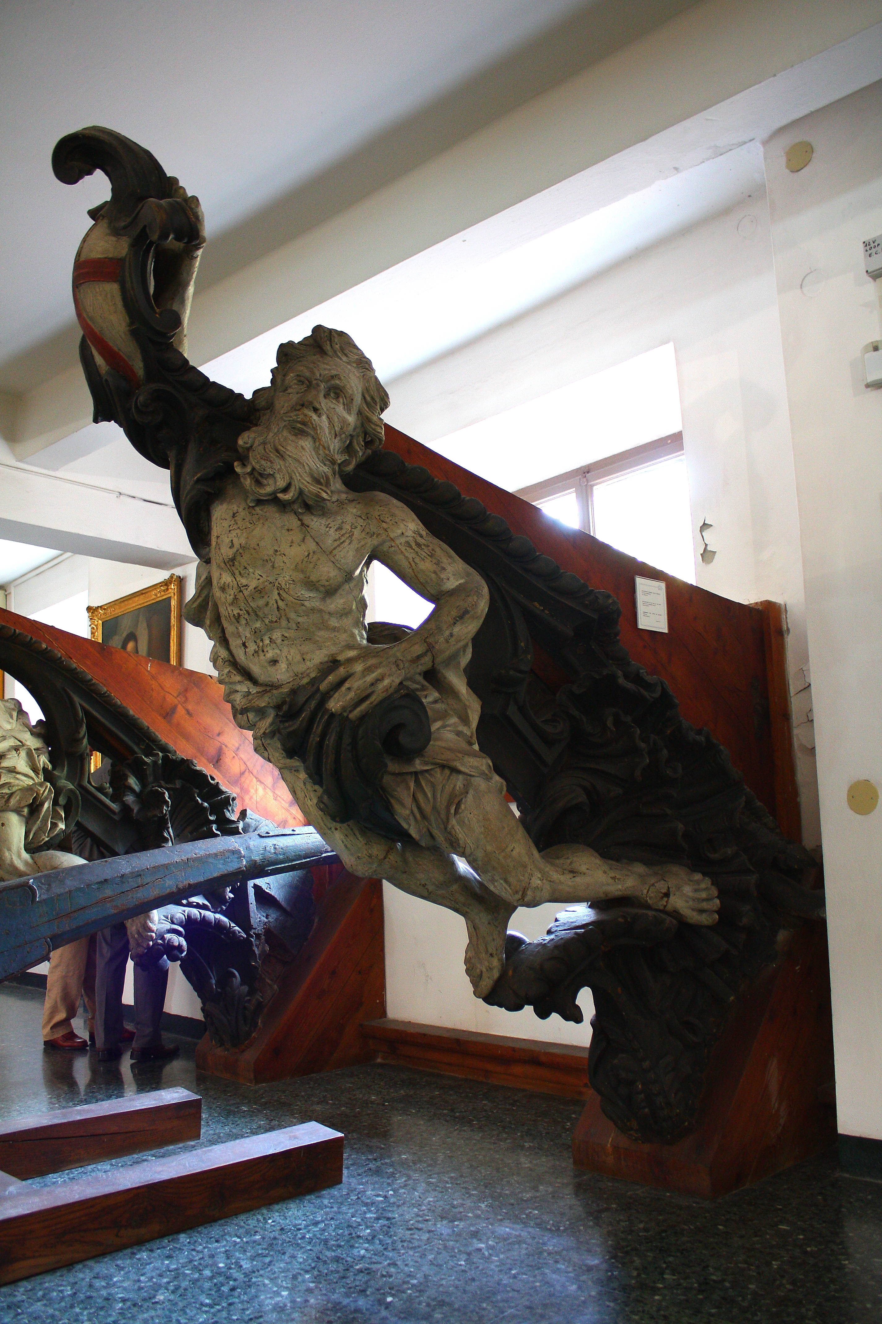 Hintere Abschlussfigur des Seitenpaneels (Ornament) einer venezianischen Galeere aus dem 17. Jahrhundert